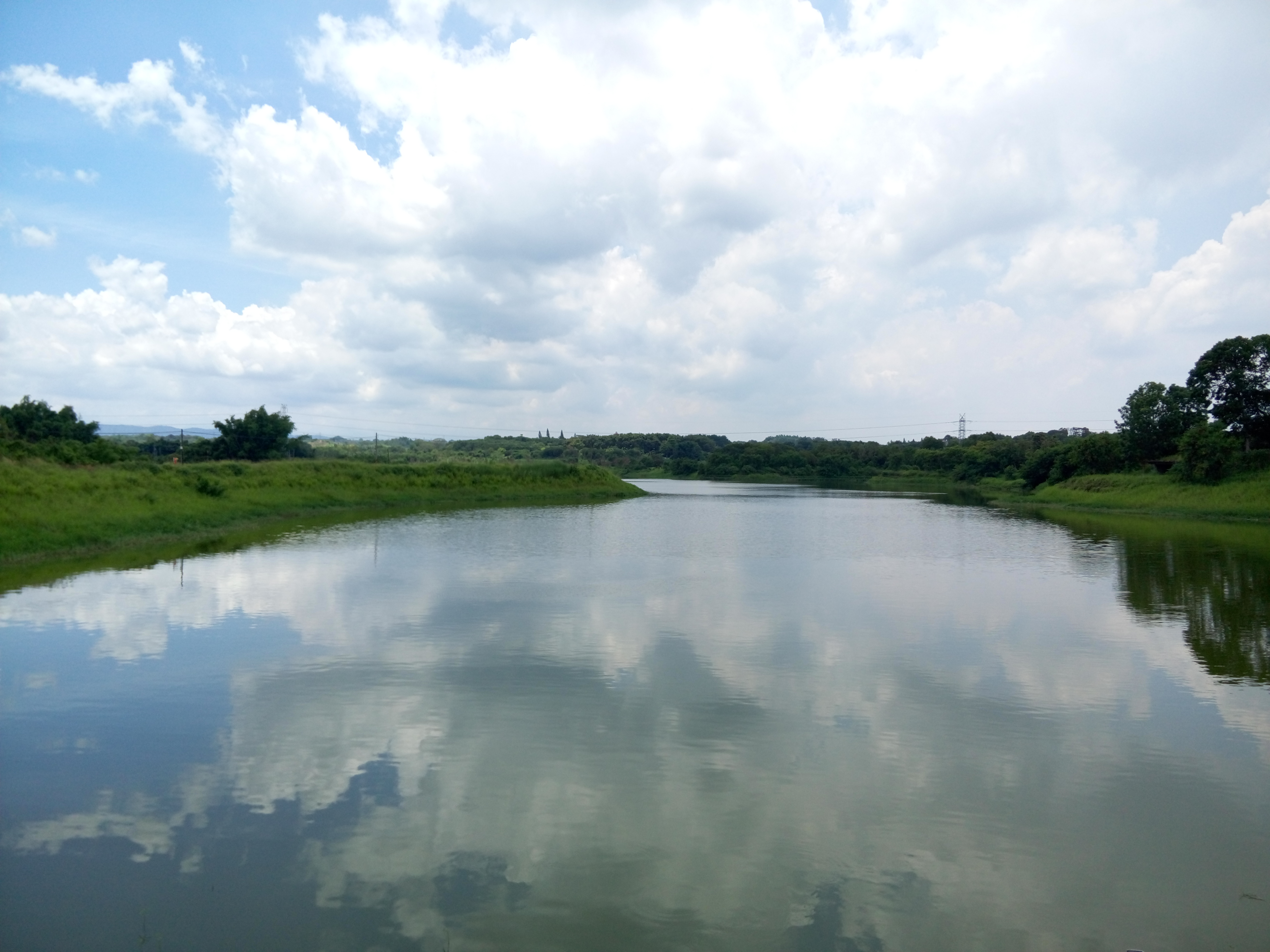 臺灣臺南市新化區鹽水埤水庫湖區風光